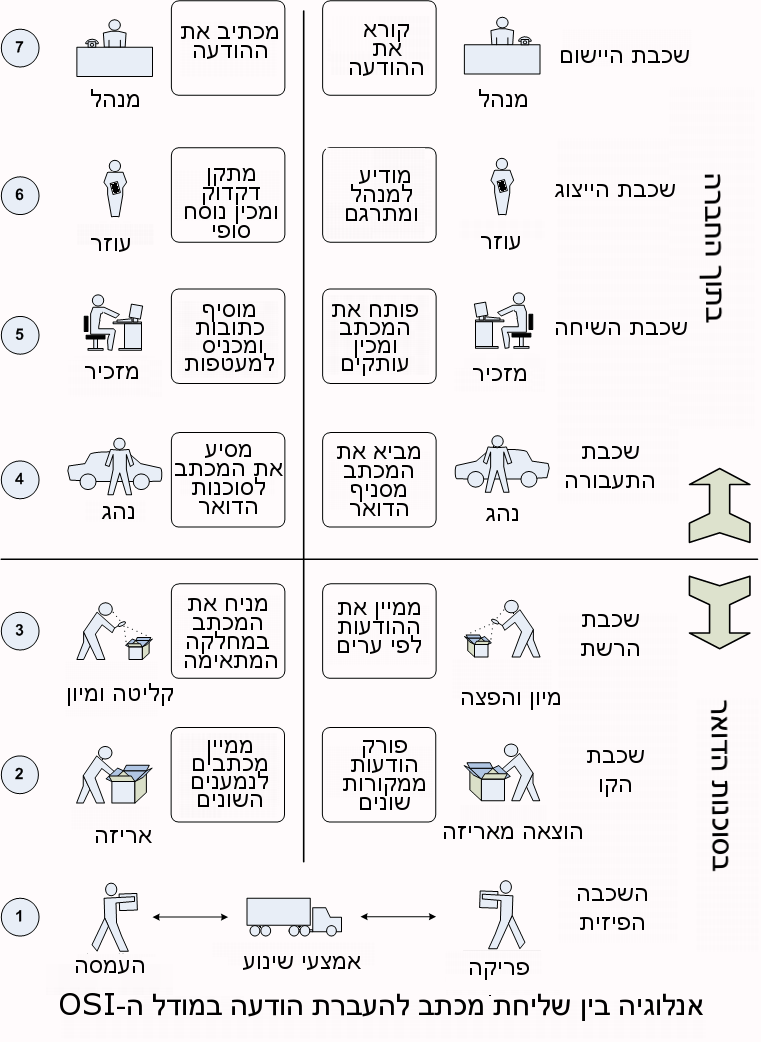 תהליך העברת נתונים מצד לצד